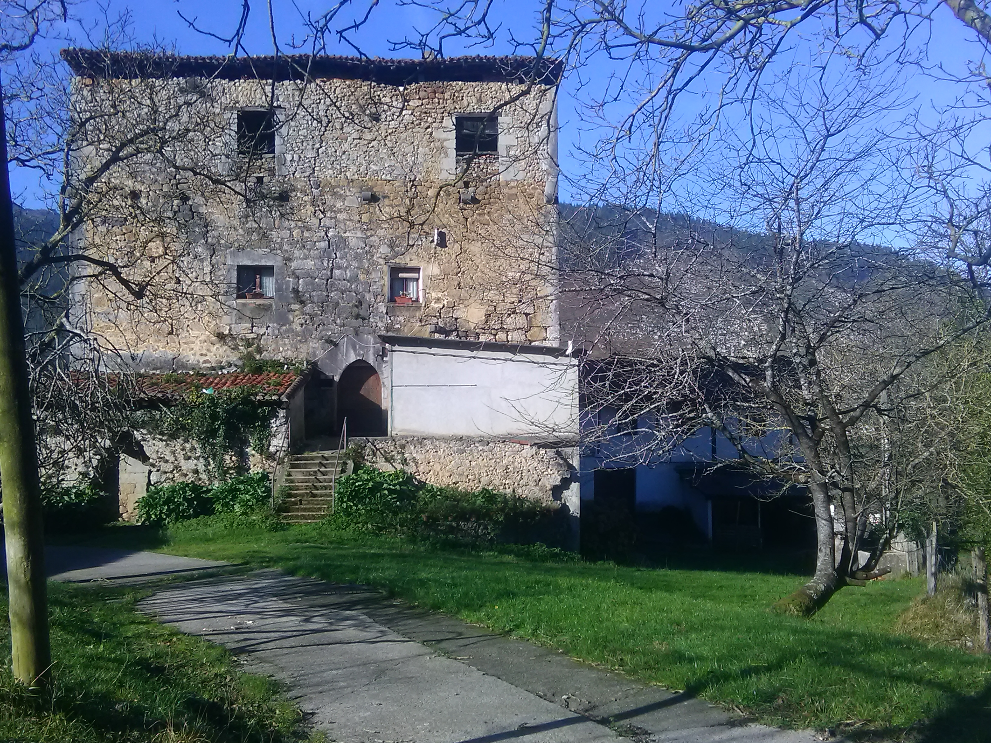 Barroeta dorretxea (Markina-Xemein). Atari nagusia.